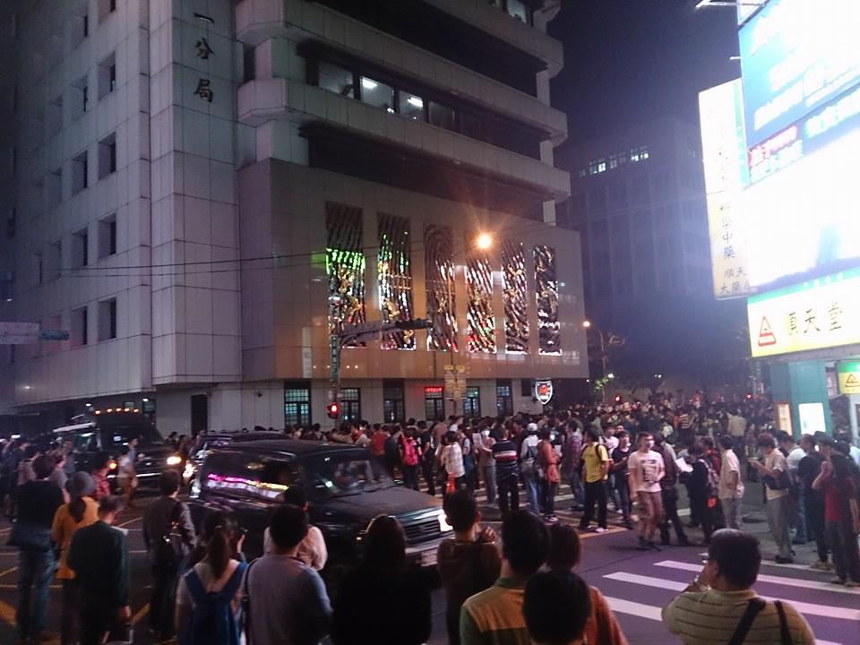 4/11晚間公園路上中正第一分局前群眾